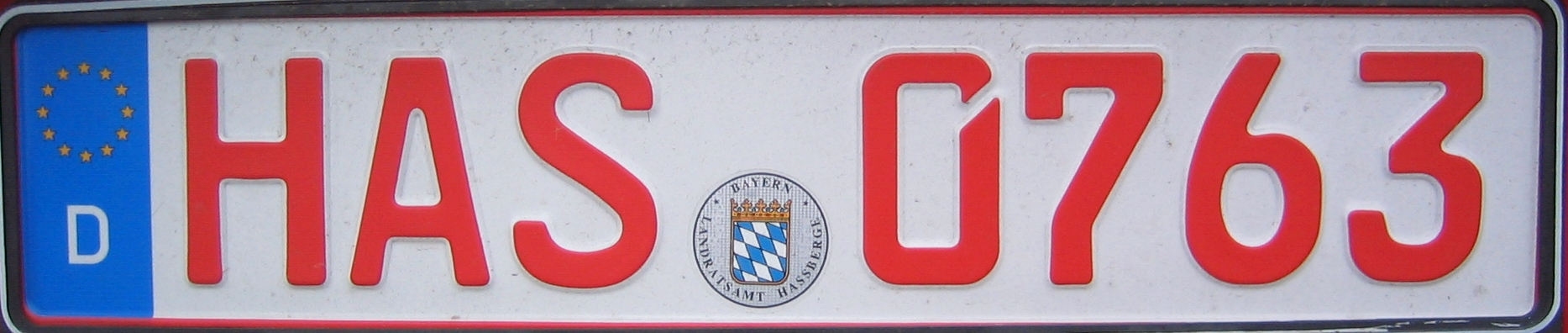 Deutsche Nummerschild, rot für Oldtimerfahrzeuge, Nummer beginnt mit "07", Nummer auf Foto aus Datenschutzgründen auf 0700 geändert./German registration plate for vintage vehicles (red version), numbers changed (privacy protection)